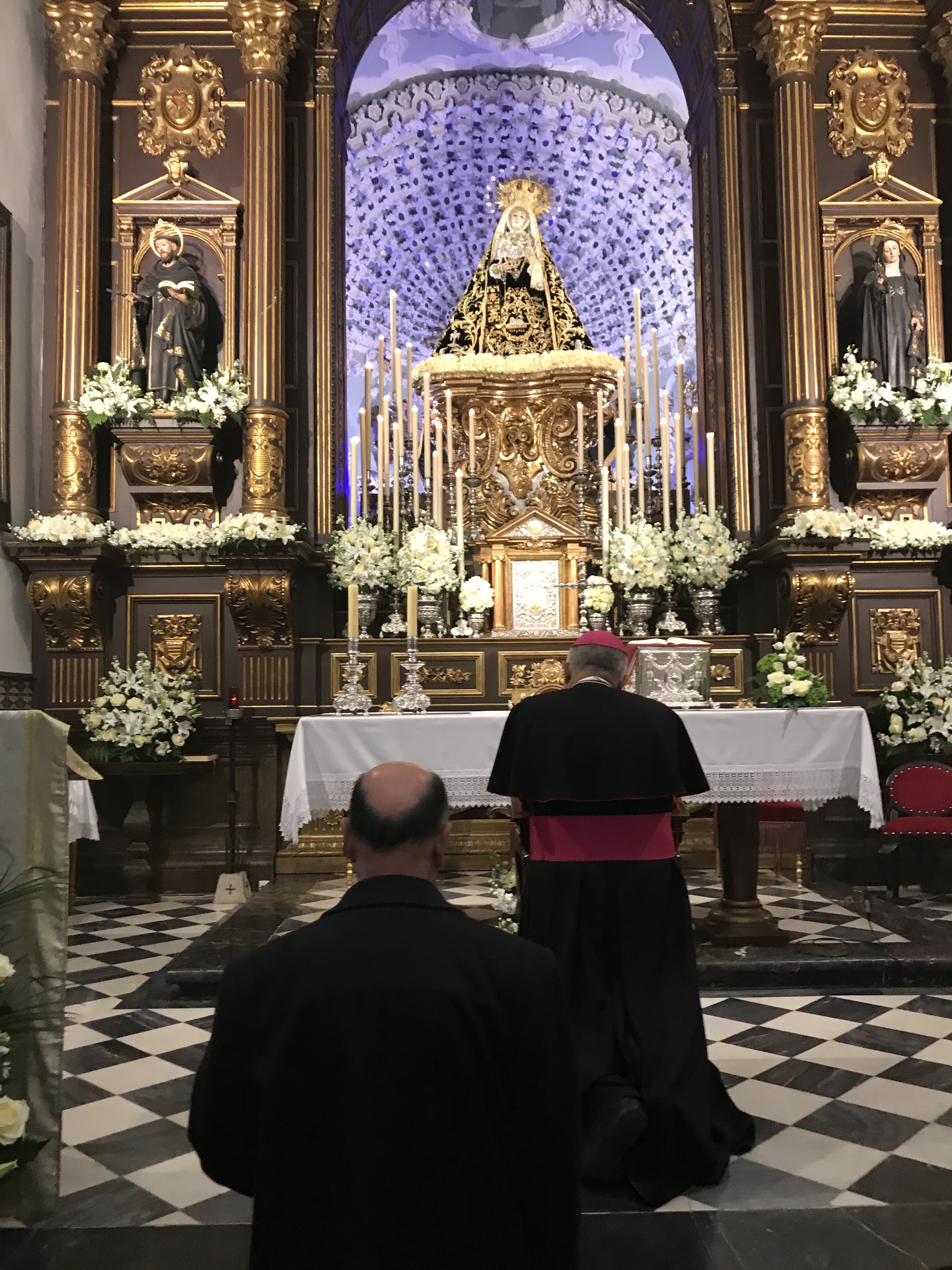 El obispo de Córdoba reza ante la Virgen de los Dolores en la iglesia de San Jacinto.